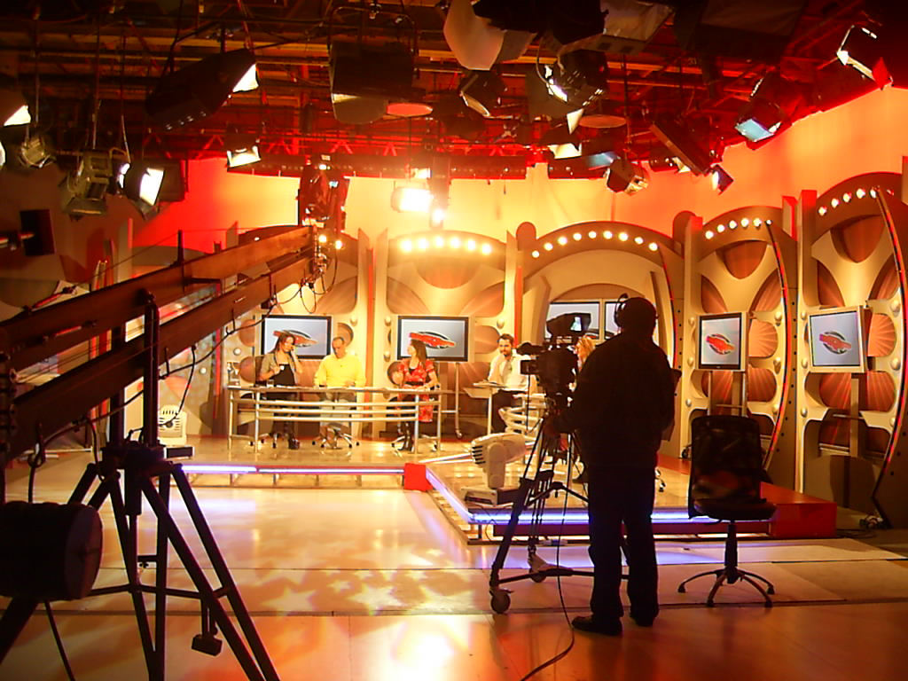 El estudio de grabación del programa SQP de Chilevisión. 5 de febrero de 2005.